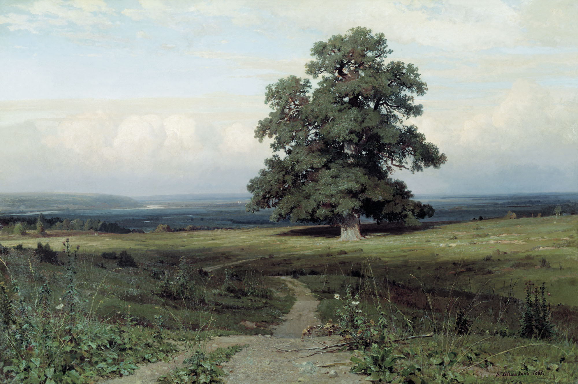 И. И. Шишкин. «Среди долины ровныя…». 1883. Холст, масло. 136,5 × 203,5 см. Национальный музей «Киевская картинная галерея», Киев, Украина.